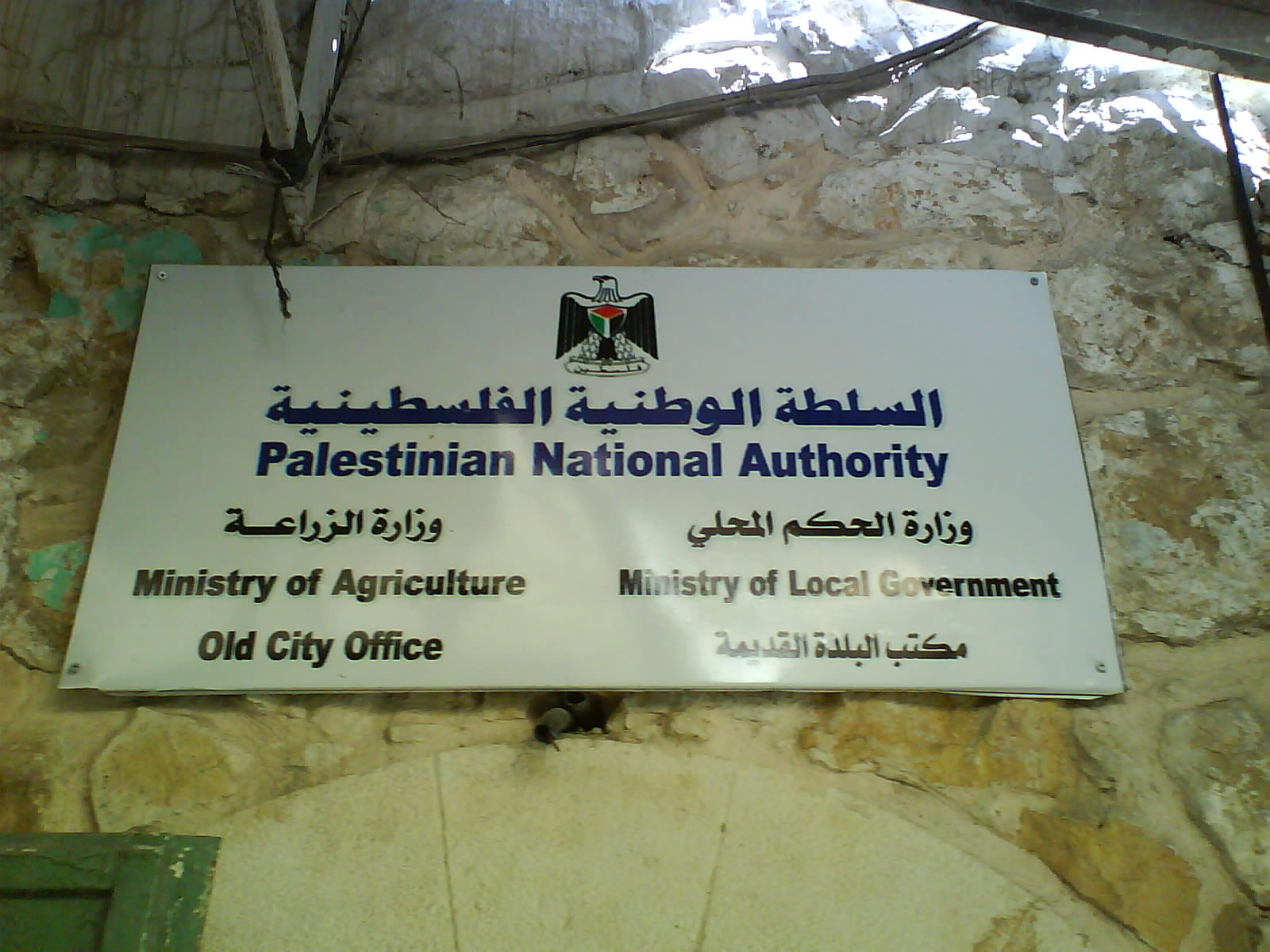 Palestinian National Authority - Ministry of Agriculture, Ministry of Local Government, Hebron Old City Office